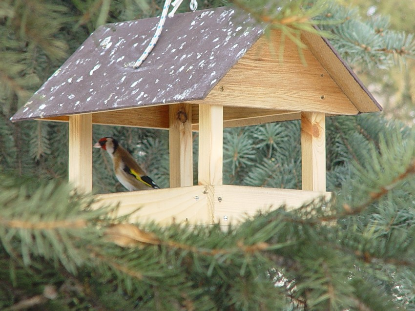 Madár egy etetőben